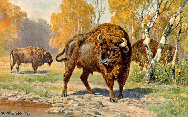 European Bison, Baktus